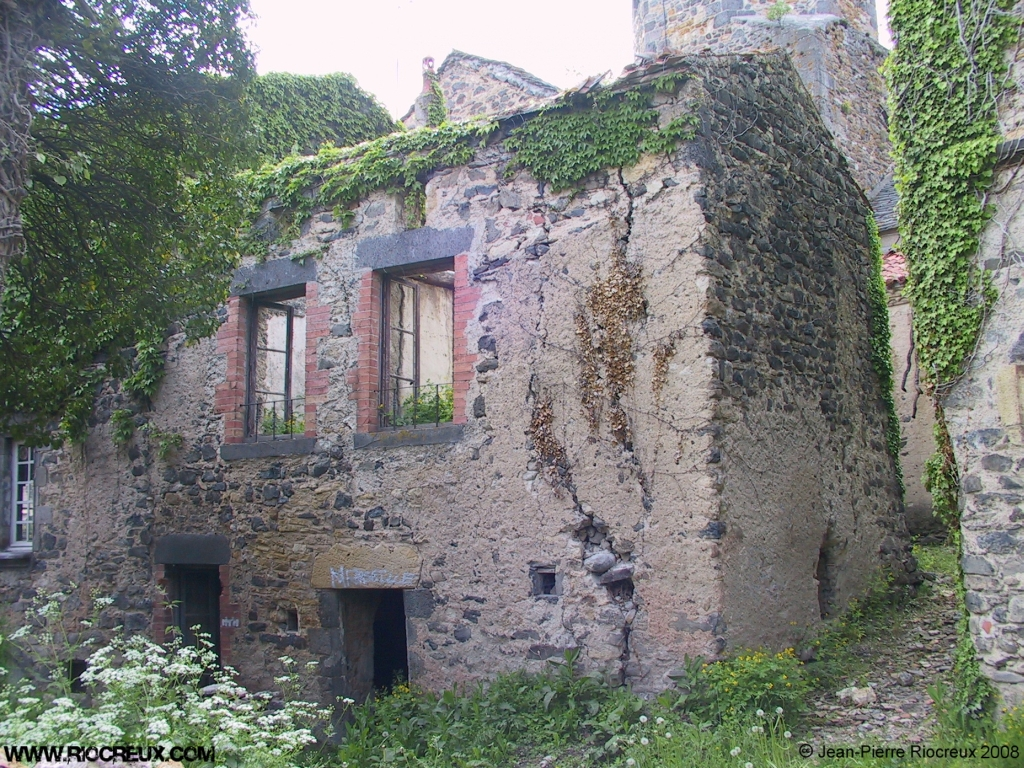 Vue d'un des murs d'enceinte du fort villageois de Mareugheol.